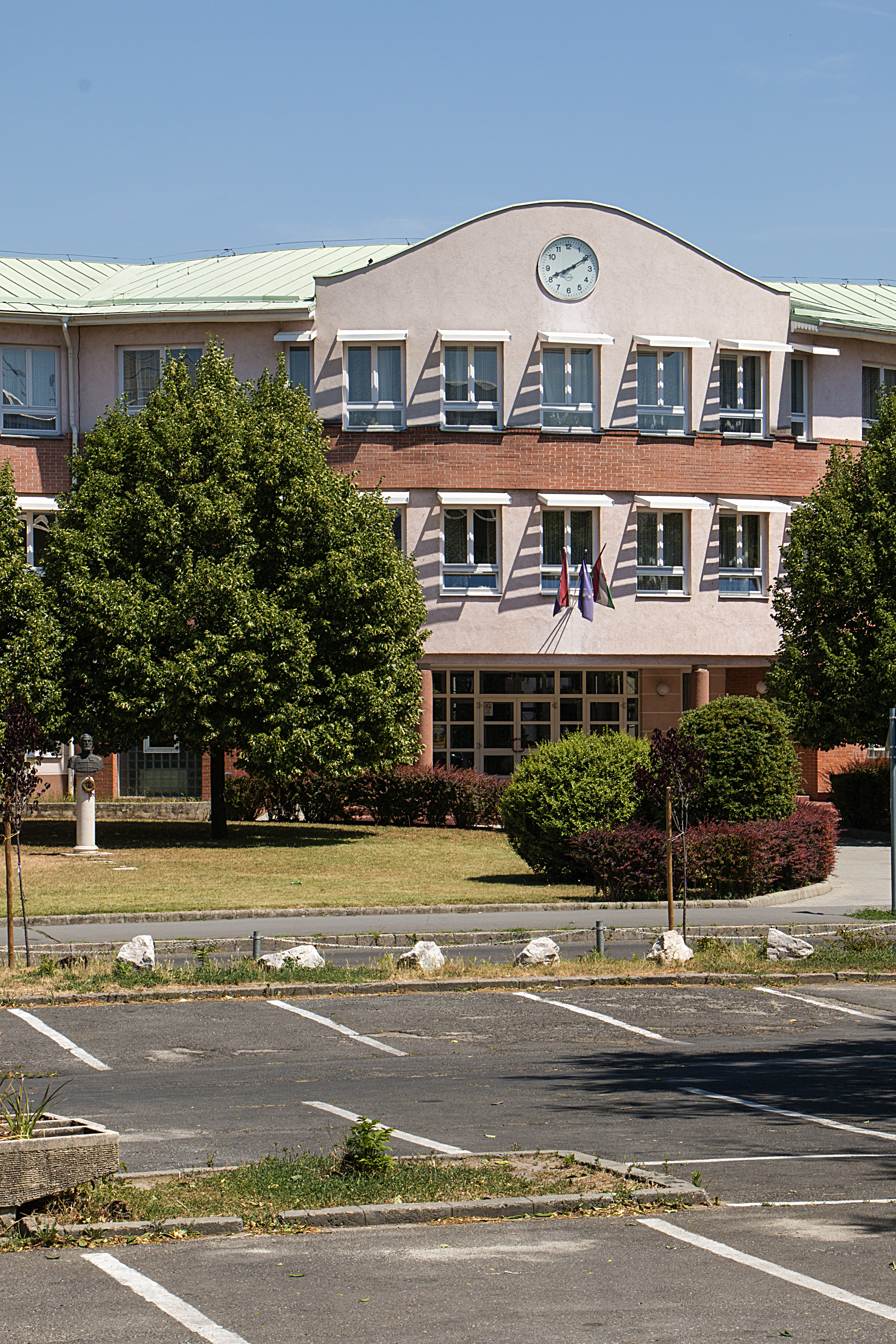 A Horvát Óvoda, Általános Iskola, Gimnázium és Kollégium (HOŠIG) épületének részlete (Budapest, XIV. kerület Kántorné sétány 1-3)